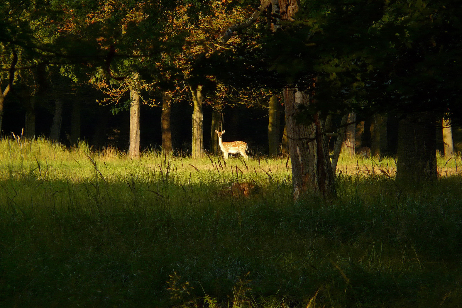 Daněk evropský v pozadí